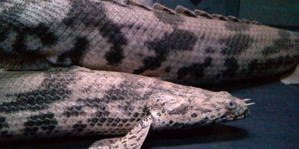 ブリード個体